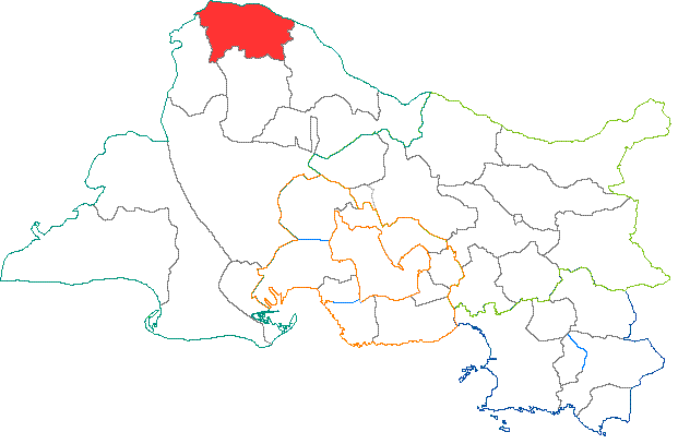 Situation du canton dans le département des Bouches-du-Rhône (France)